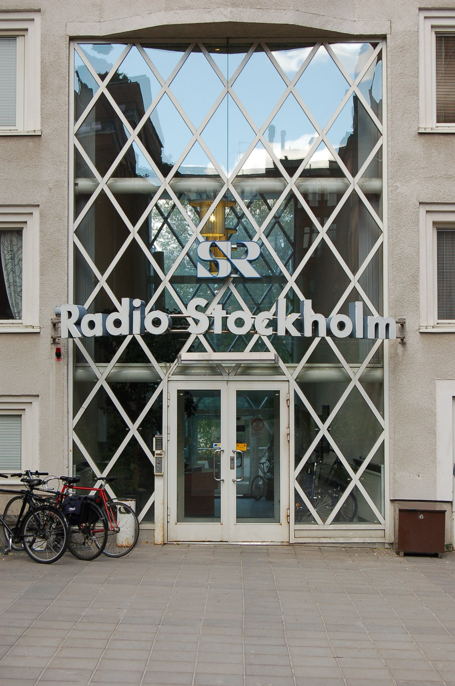 Entren till Radio Stockholm (Pipersgatan)